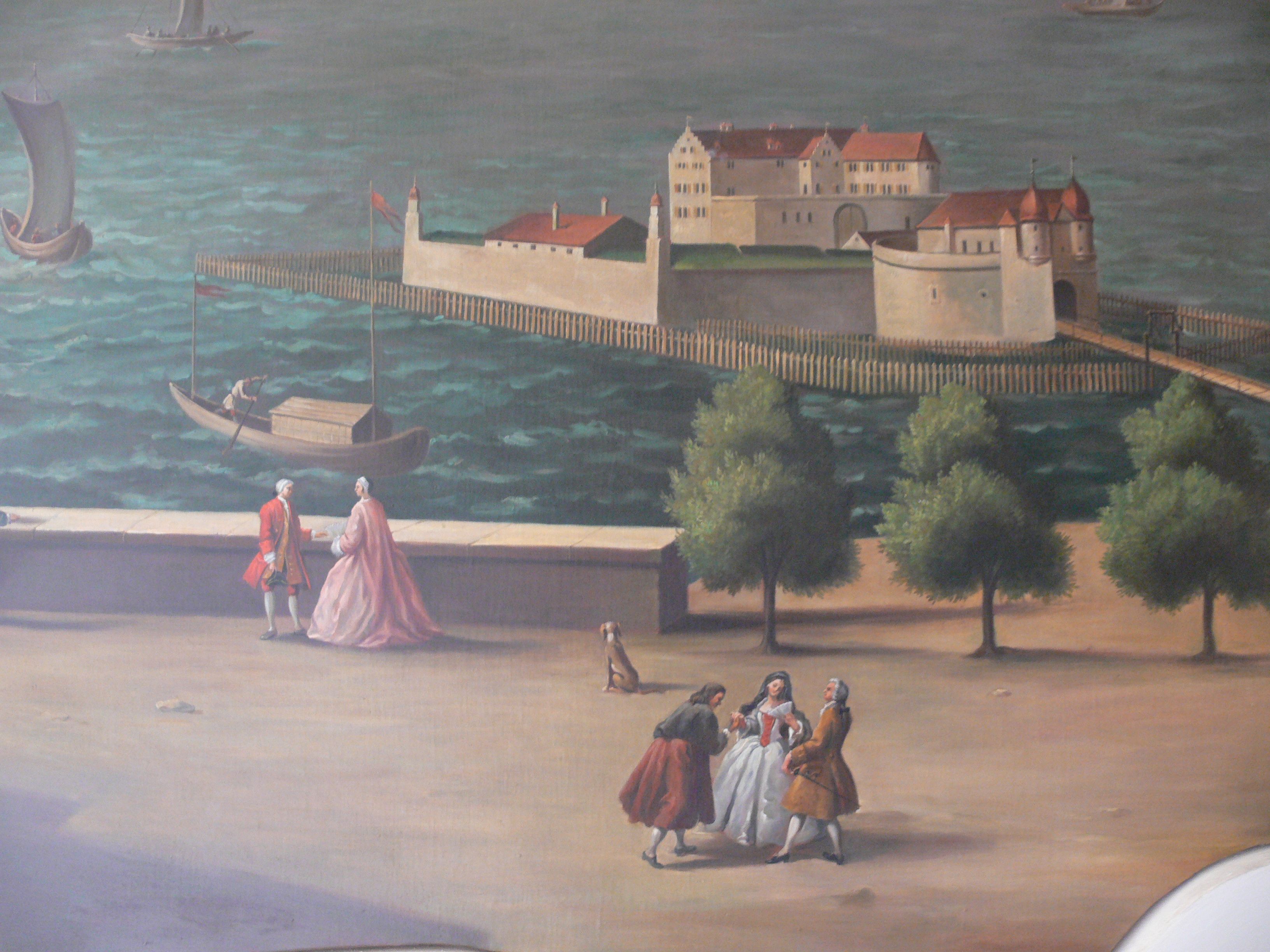 Gemälde der Schlösser der Grafen von Montfort im Flur des Neuen Schlosses in Tettnang: Wasserschloss Argen (Langenargen), Detail; Kopie von 1974